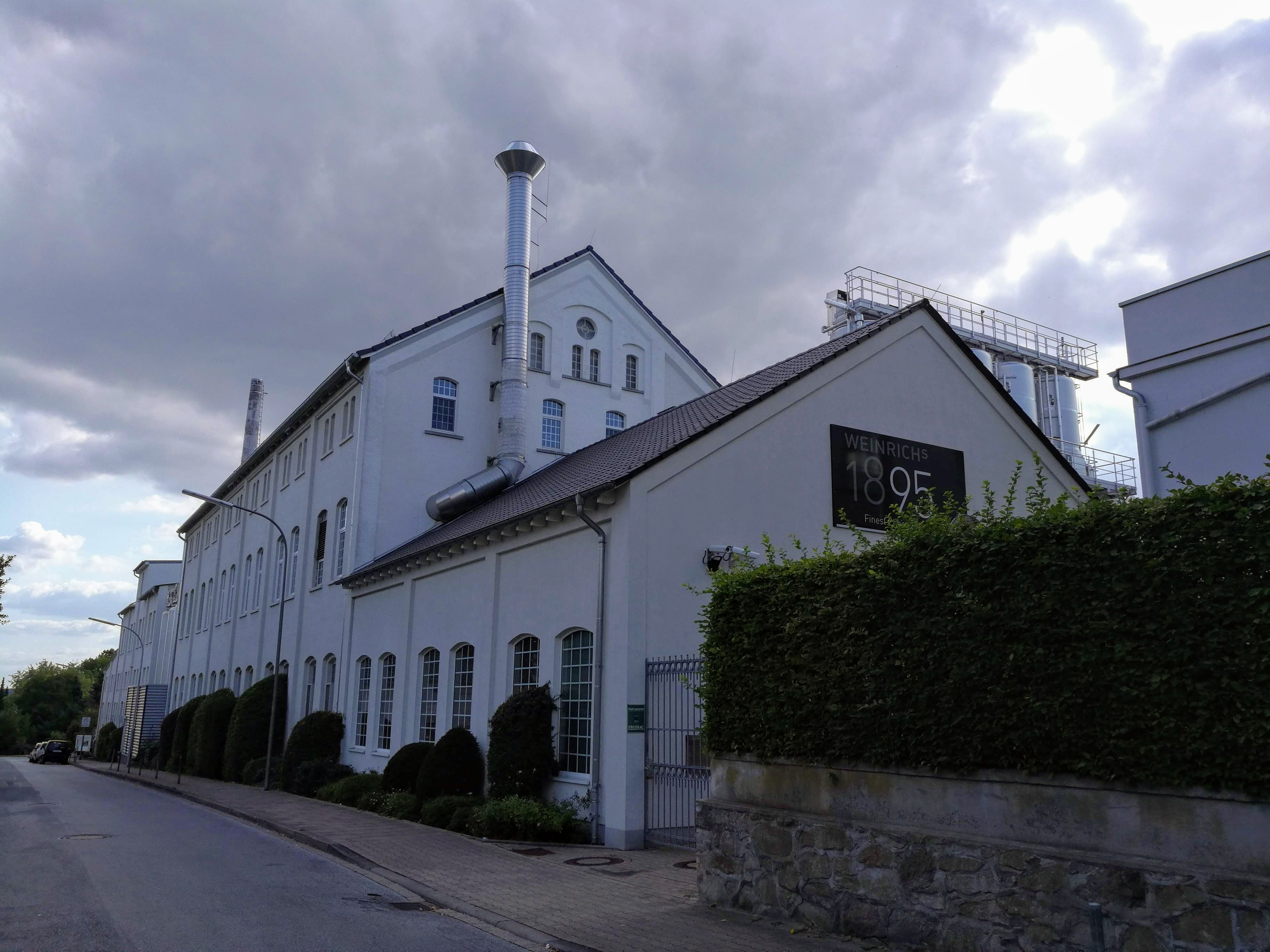 Weinrich Herford Produktionsgebäude